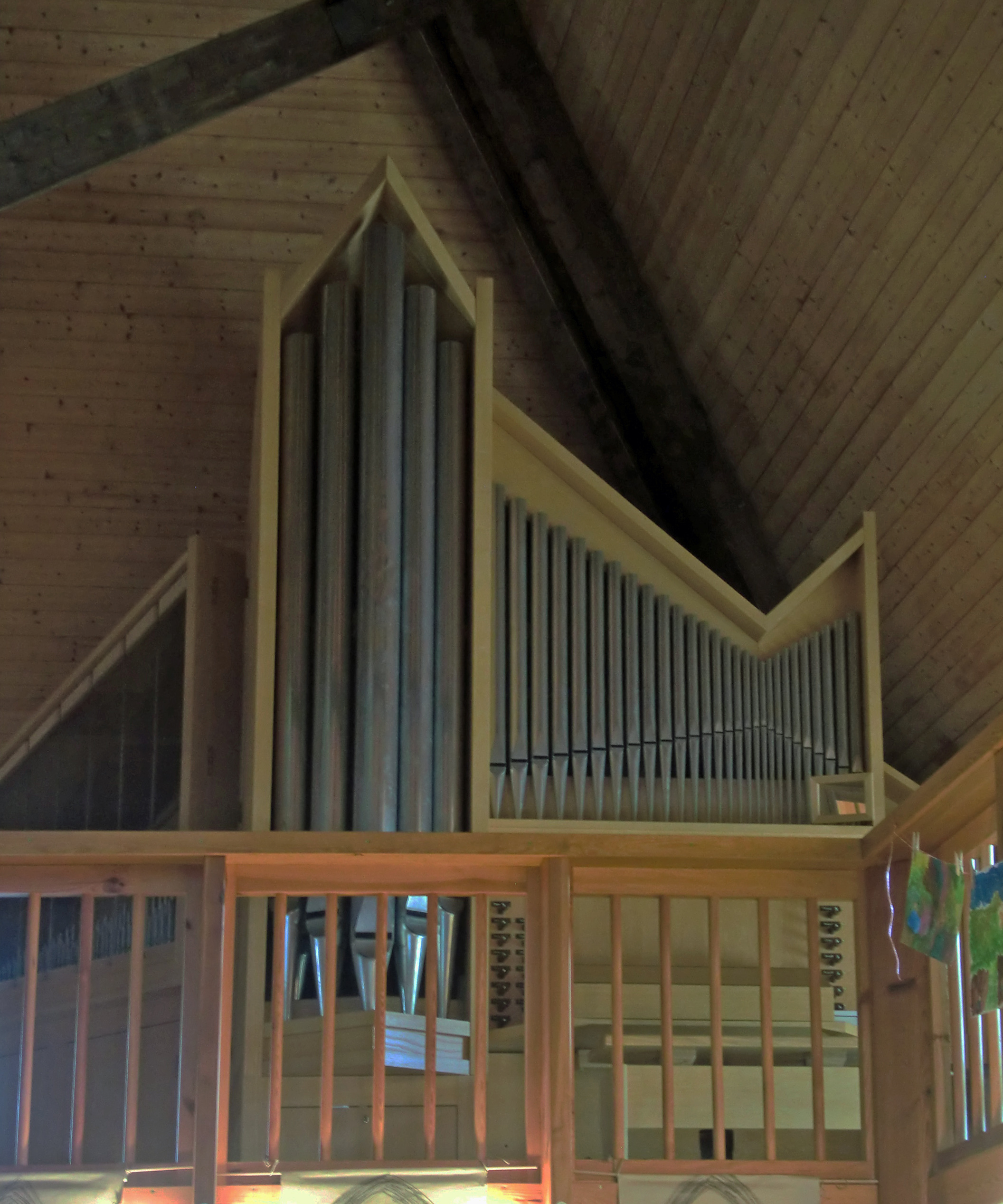 Kirche in Altenberg